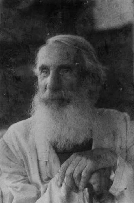 Vasilij Vasil'evic Bervi-Flerovskij (1829-1918)